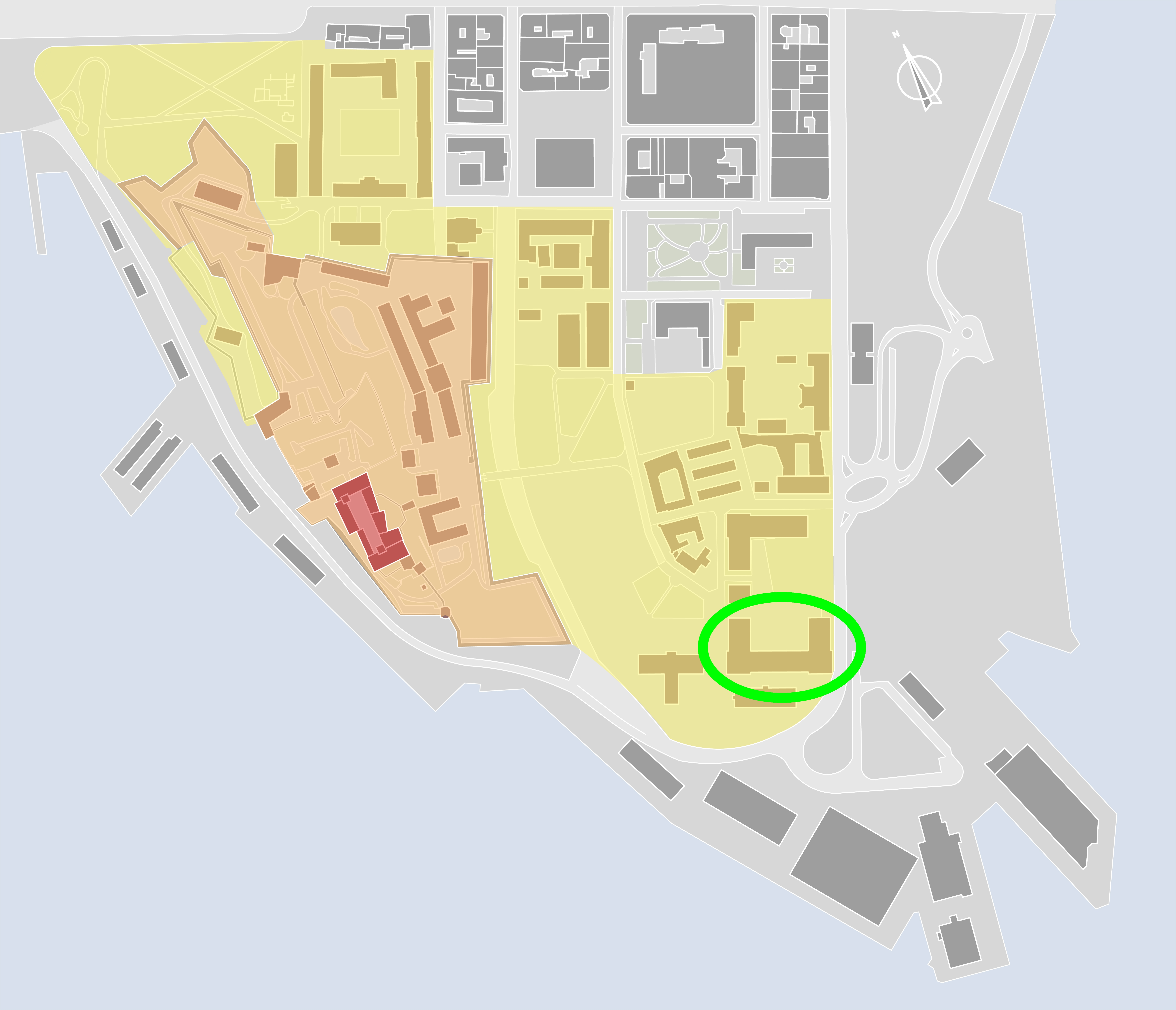 Lage des Norwegischen Verteidigungsmuseums (Forsvarsmuseet) im Gebäude des Hauptarsenals (Hovedarsenalet) auf dem Geländer der Festung Akershus in Oslo